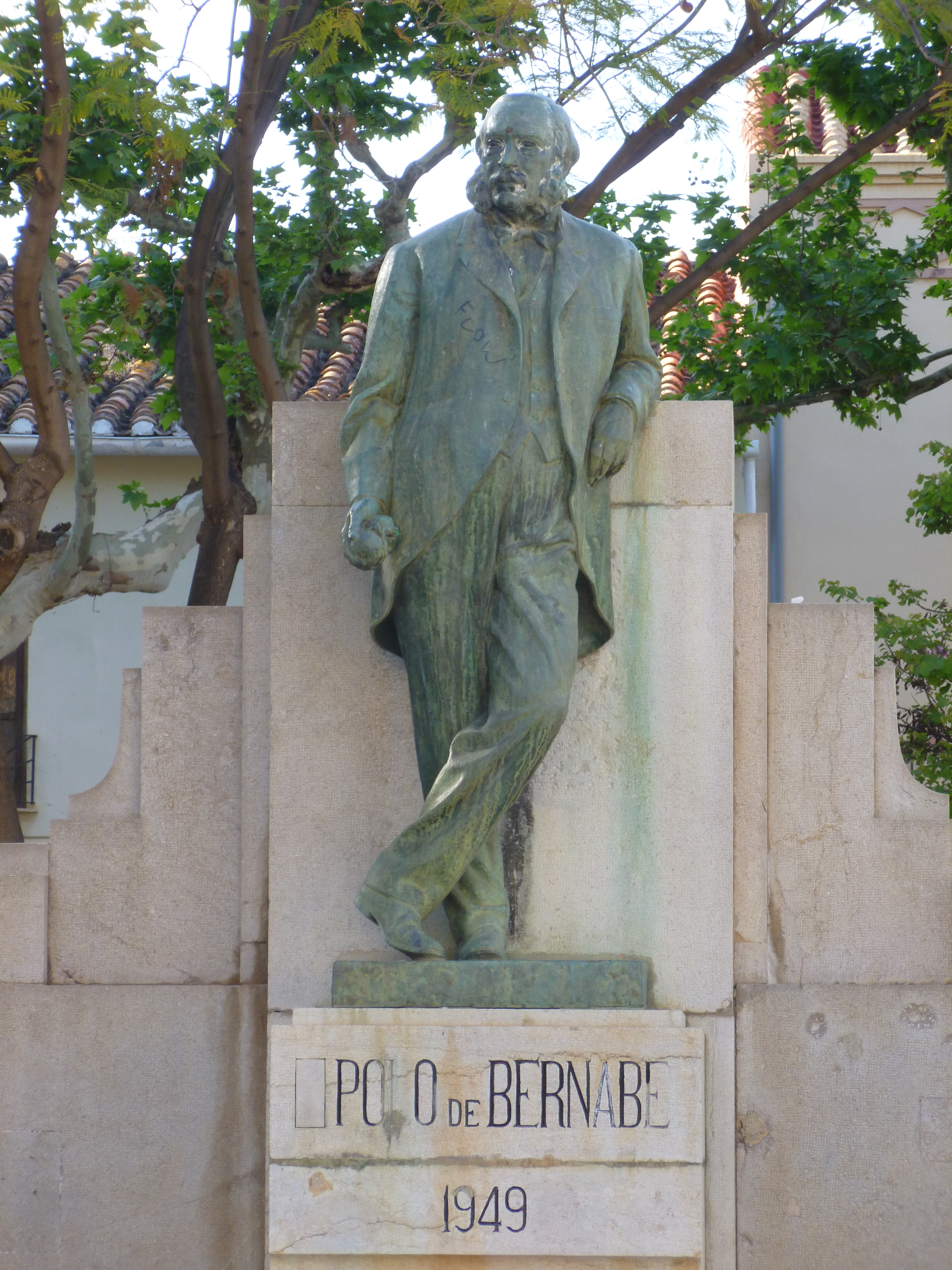 Estatua de José Polo de Bernabé y Borrás a Vila-real